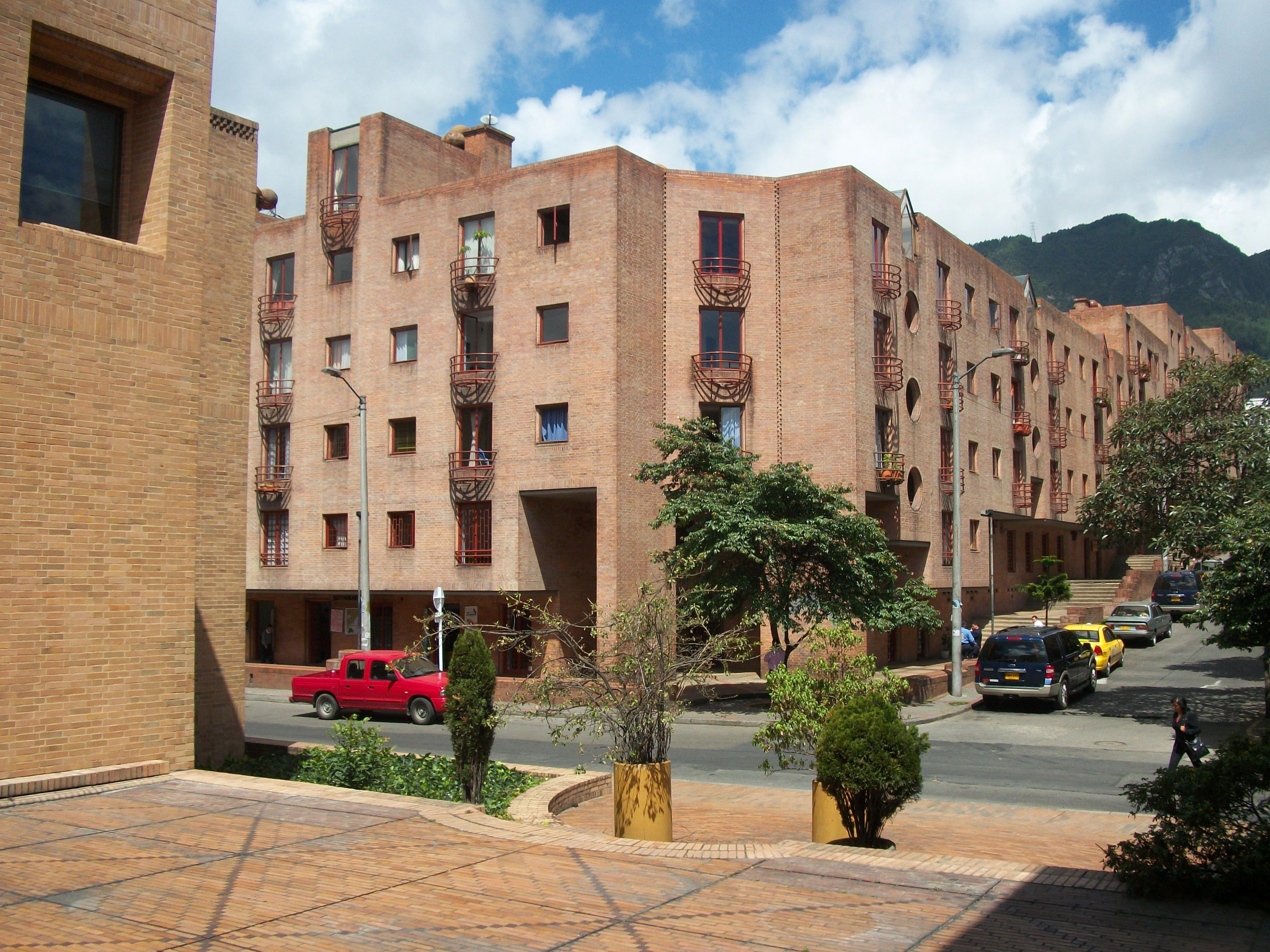 Residencias Nueva Santa Fe en Bogotá, carrera 6, calle 5.